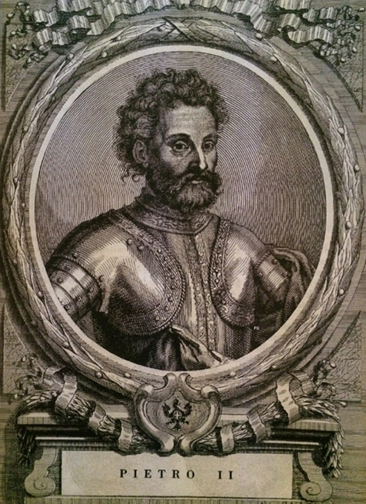 Pietro II di Savoia ( 1203 - 1268)